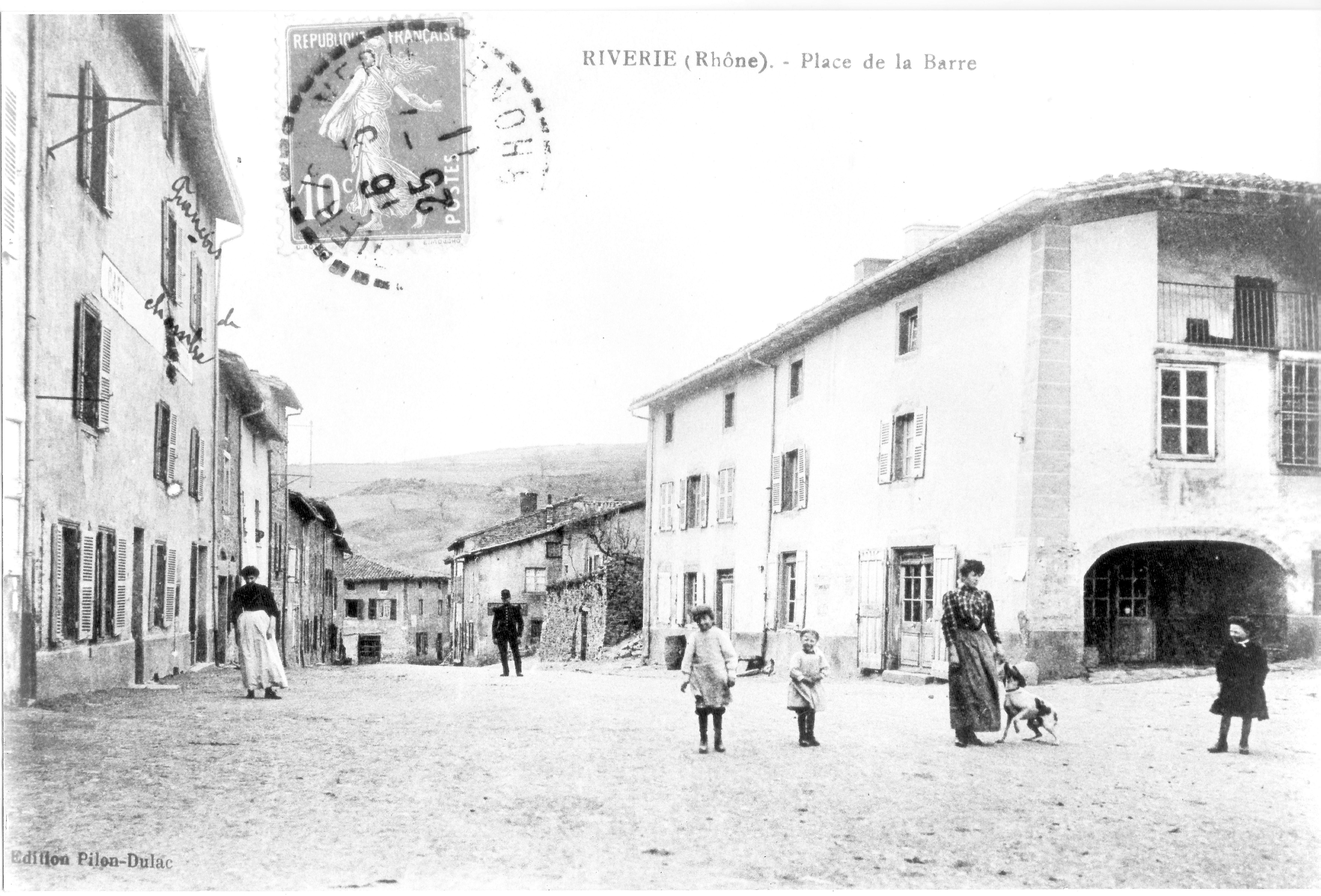 Place de la Barre RIVERIE (Rhône)